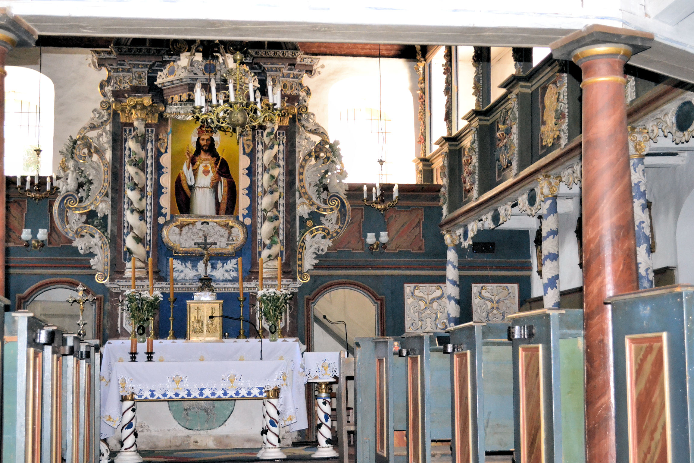 Witnica (gmina Moryń)